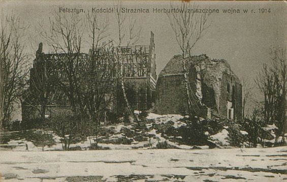 Felsztyn, pocztowka, miasto po inwazji rosyjskiej